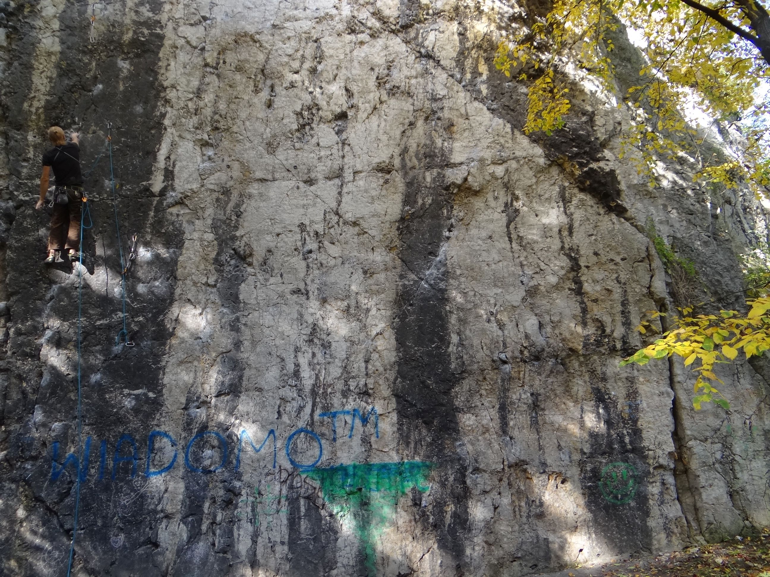 Mur skalny "Esteci" w dawnym kamieniołomie pod św. Benedyktem na Krzemionkach Podgórskich w Krakowie